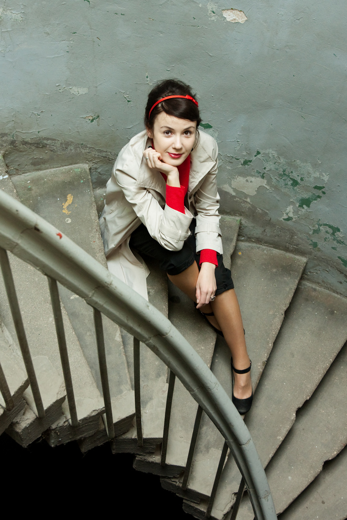 Näitleja Maarja Mitt 2011. aastal Tartus.